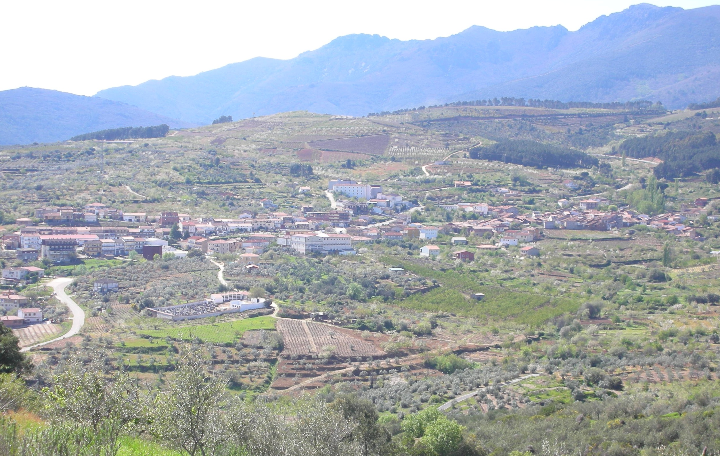 Vue générale de la Commune de Sotoserrano en Espagne